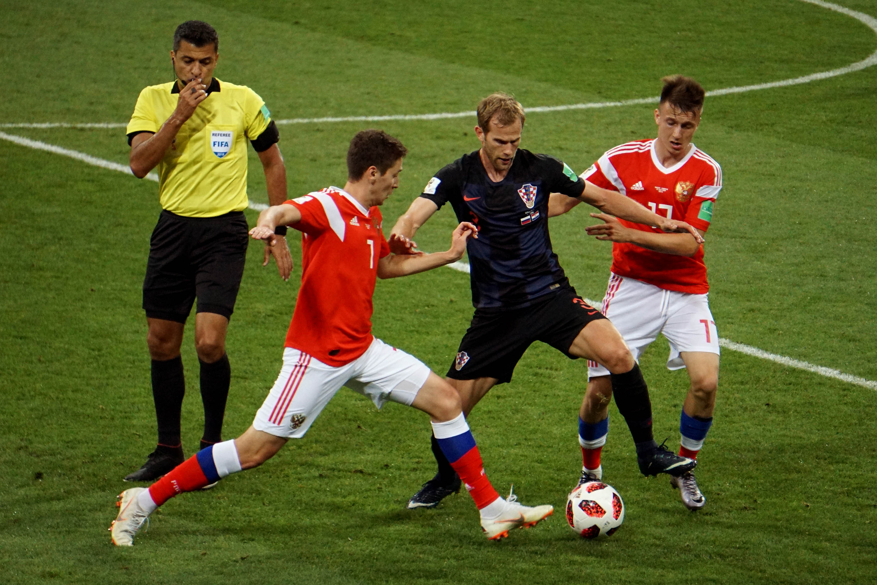 7 июля 2018 года сборная Хорватии обыграла сборную России со счётом 2:2 (4:3) по пенальти на ЧМ-2018 на стадионе «Фишт».